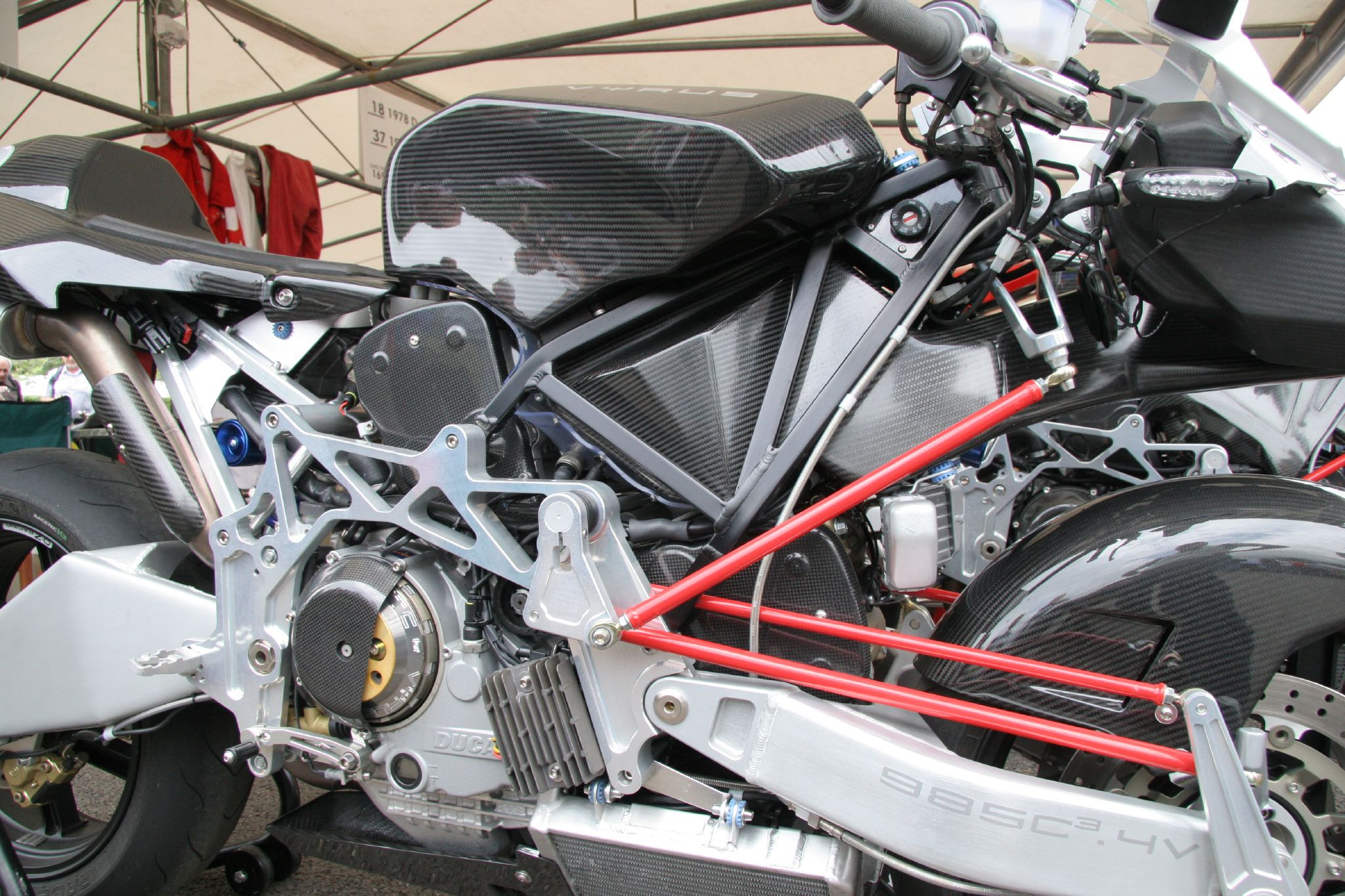 Détail du système de guidage de la Vyrus 985 C3 4V